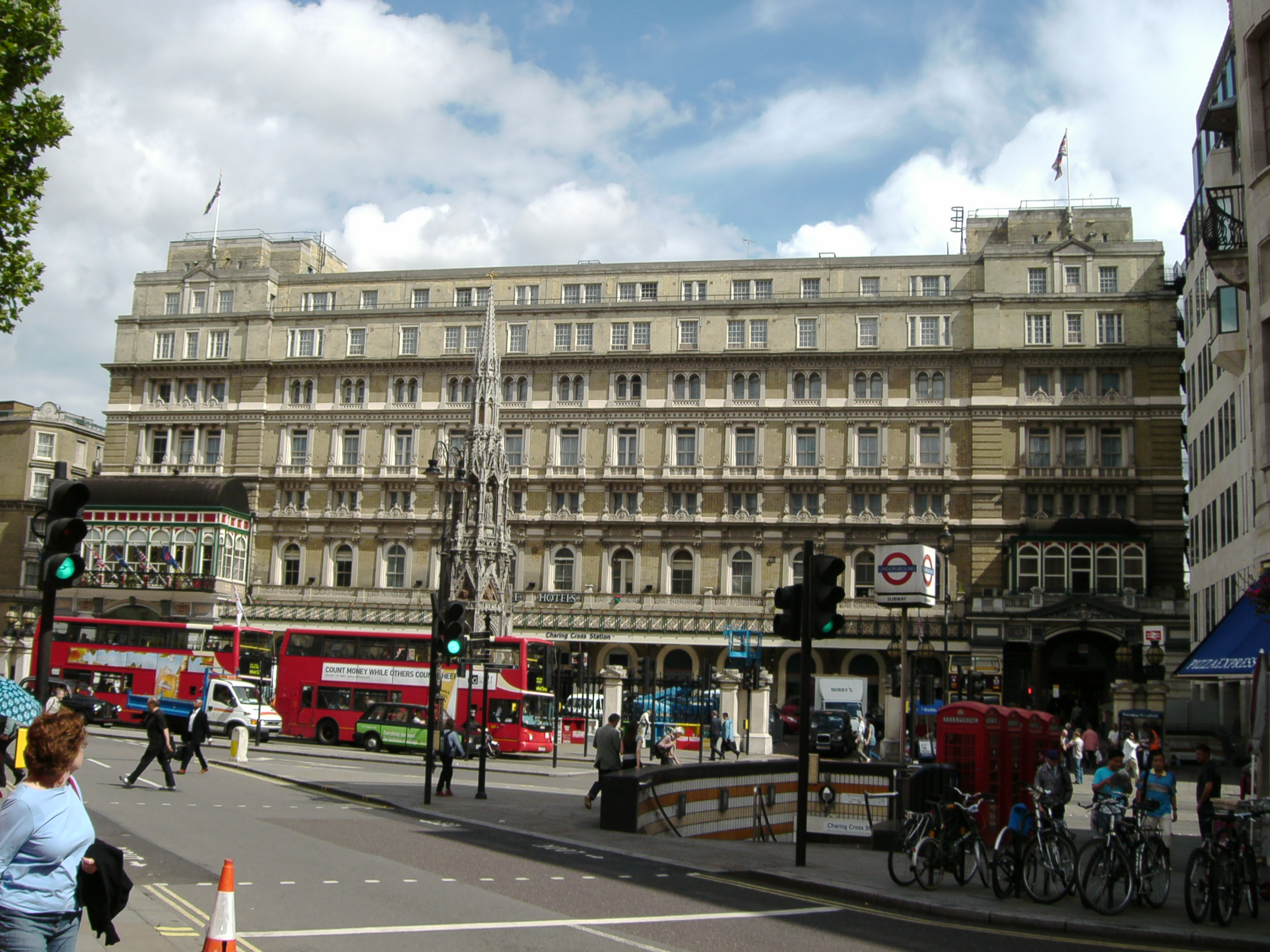 Fassade des Bahnhofs Charing Cross